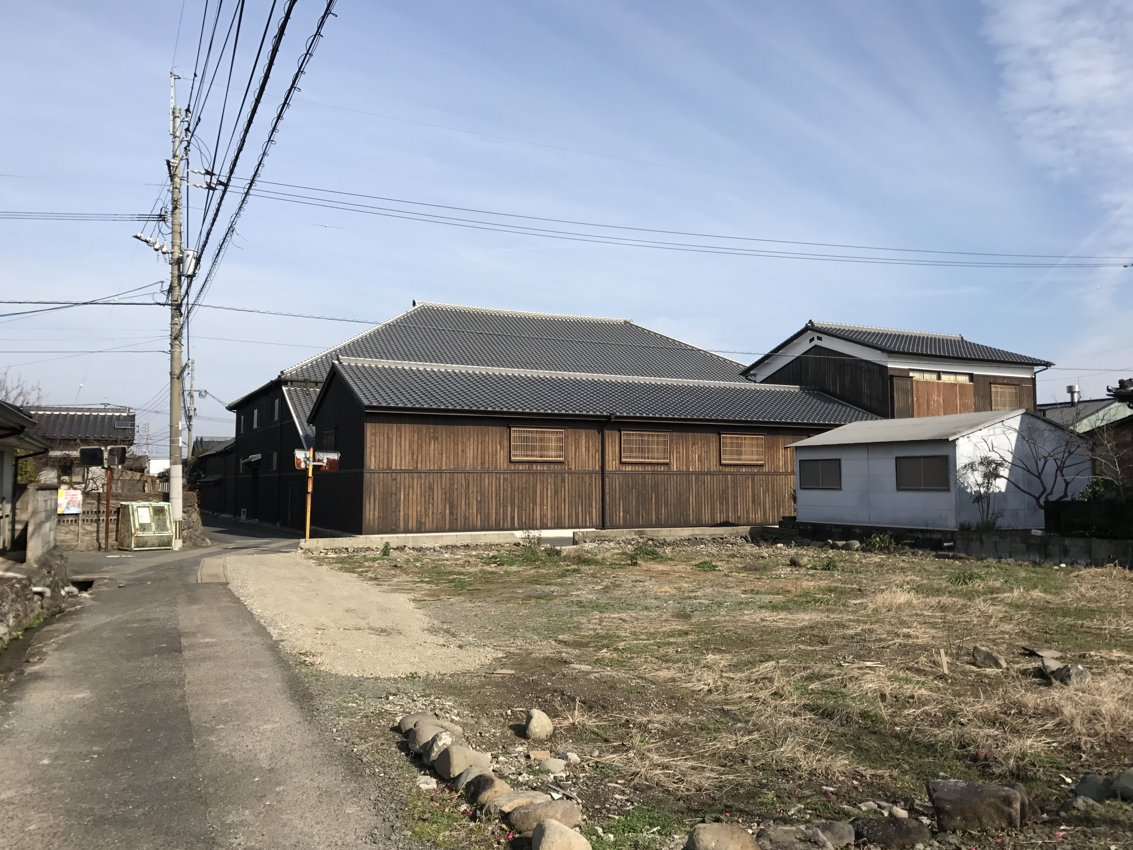 南西側より望む佐賀県鹿島市の富久千代酒造